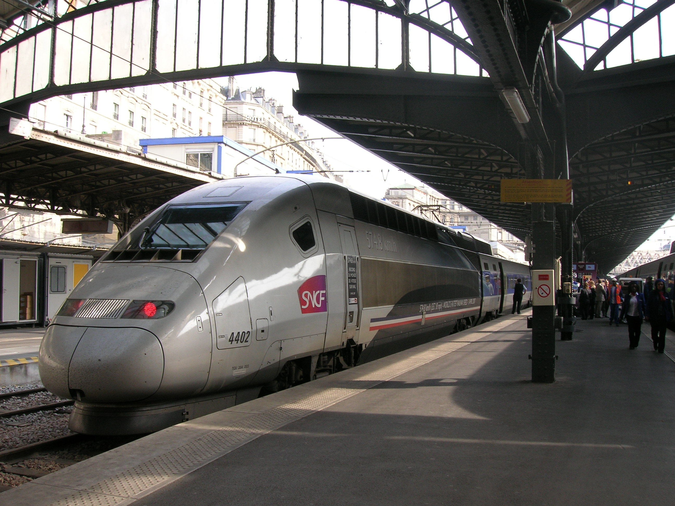 Rame TGV 4402 (Record du monde de vitesse) en service commercial, le 18 juin 2007 à Paris-Est